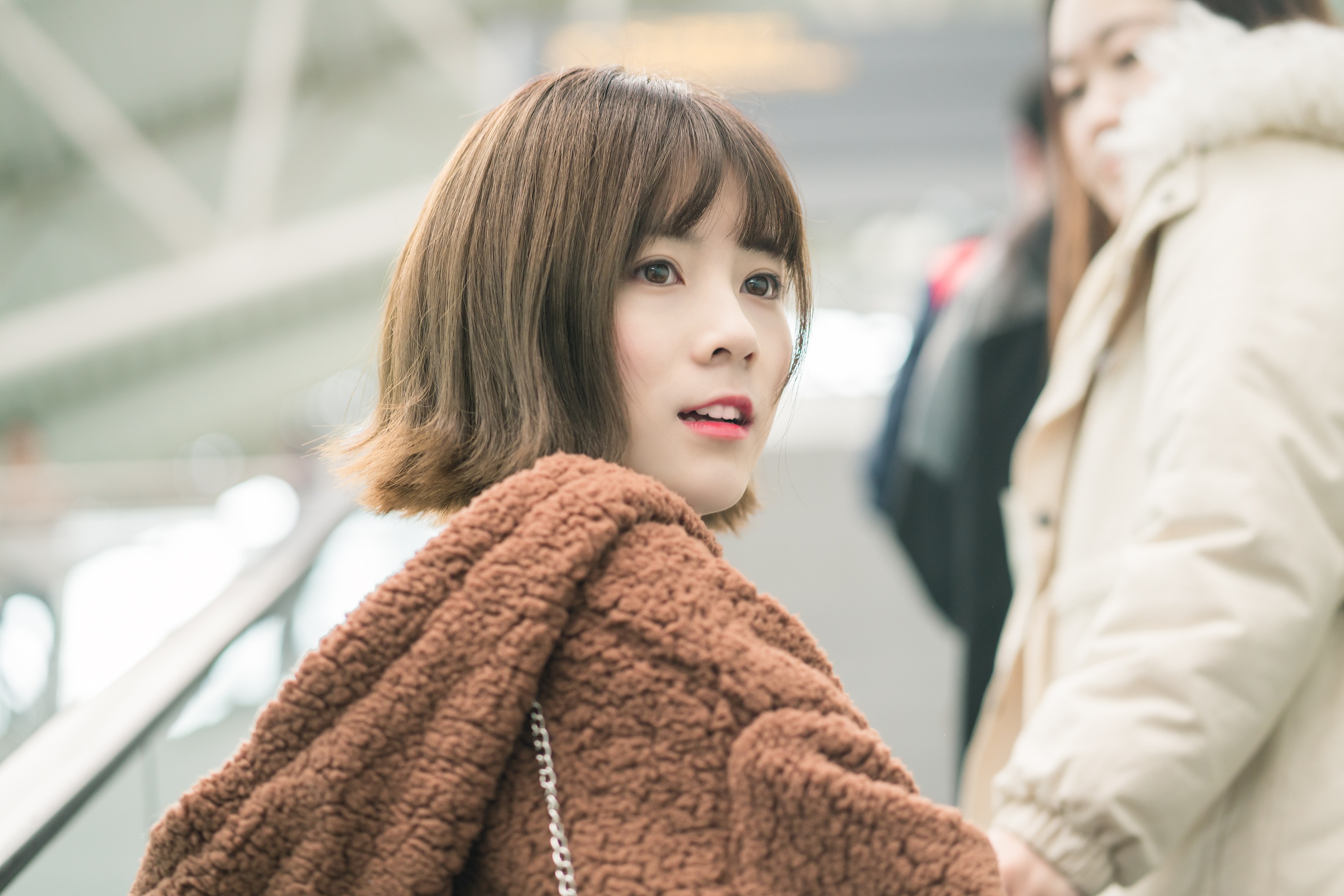 2017.12.31 白云机场~ 李梓